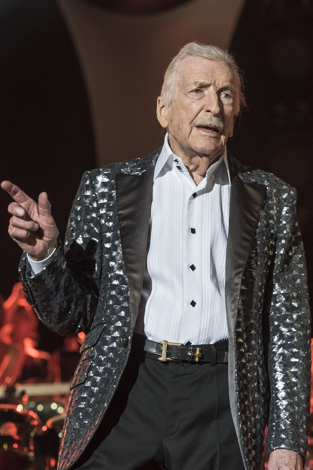 James Last (1929-2015) bei einem seiner letzten Konzerte in der Festhalle Frankfurt.